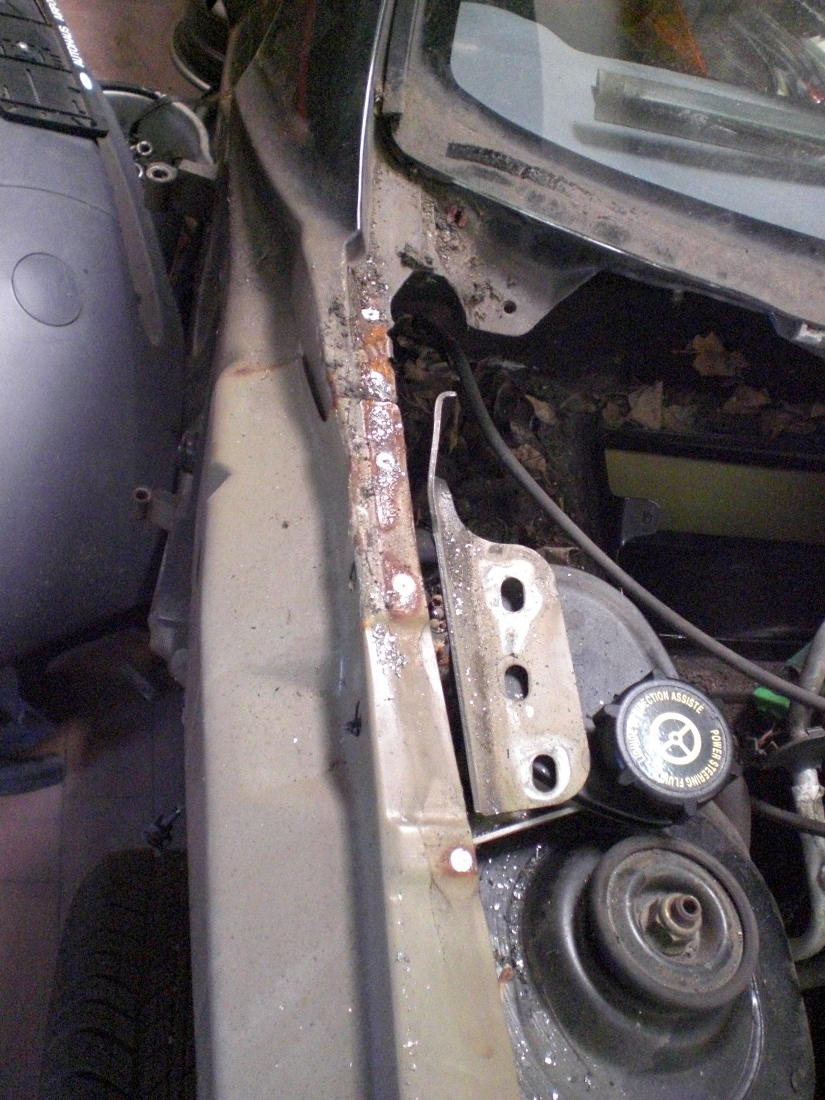 Ford Ka (2005): Korrosionsschäden vor der A-Säule, Kotflügel wurde entfernt